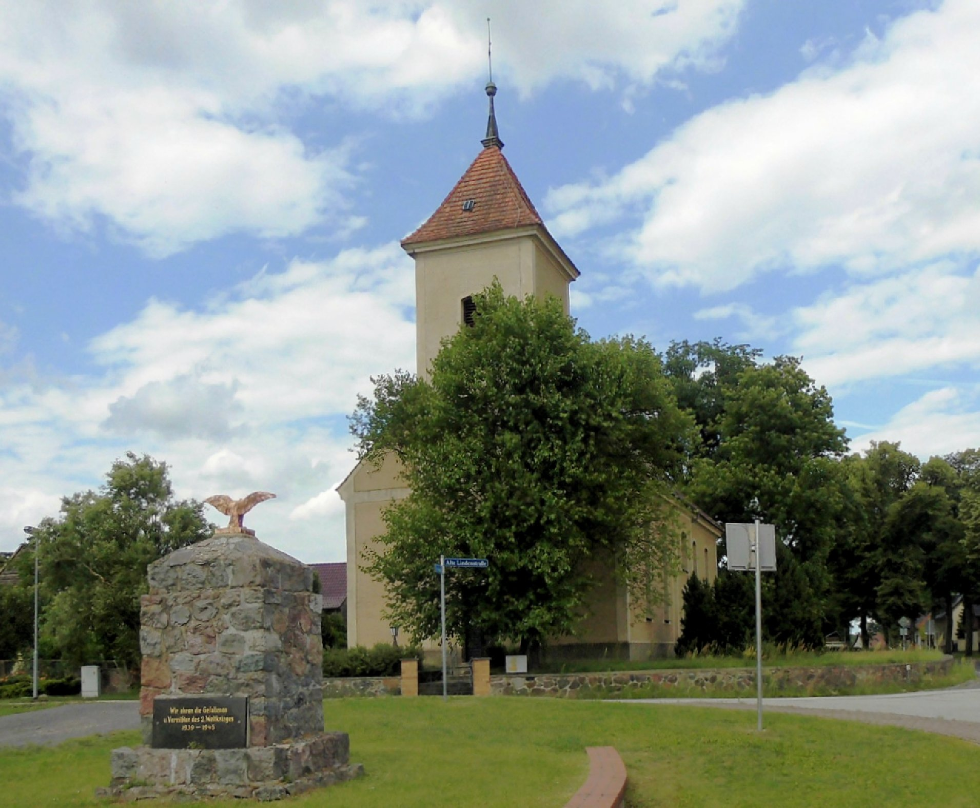 Dorfkirche in Göhlen, Gemeinde Neuzelle, Landkreis Dahme-Spreewald, Deutschland